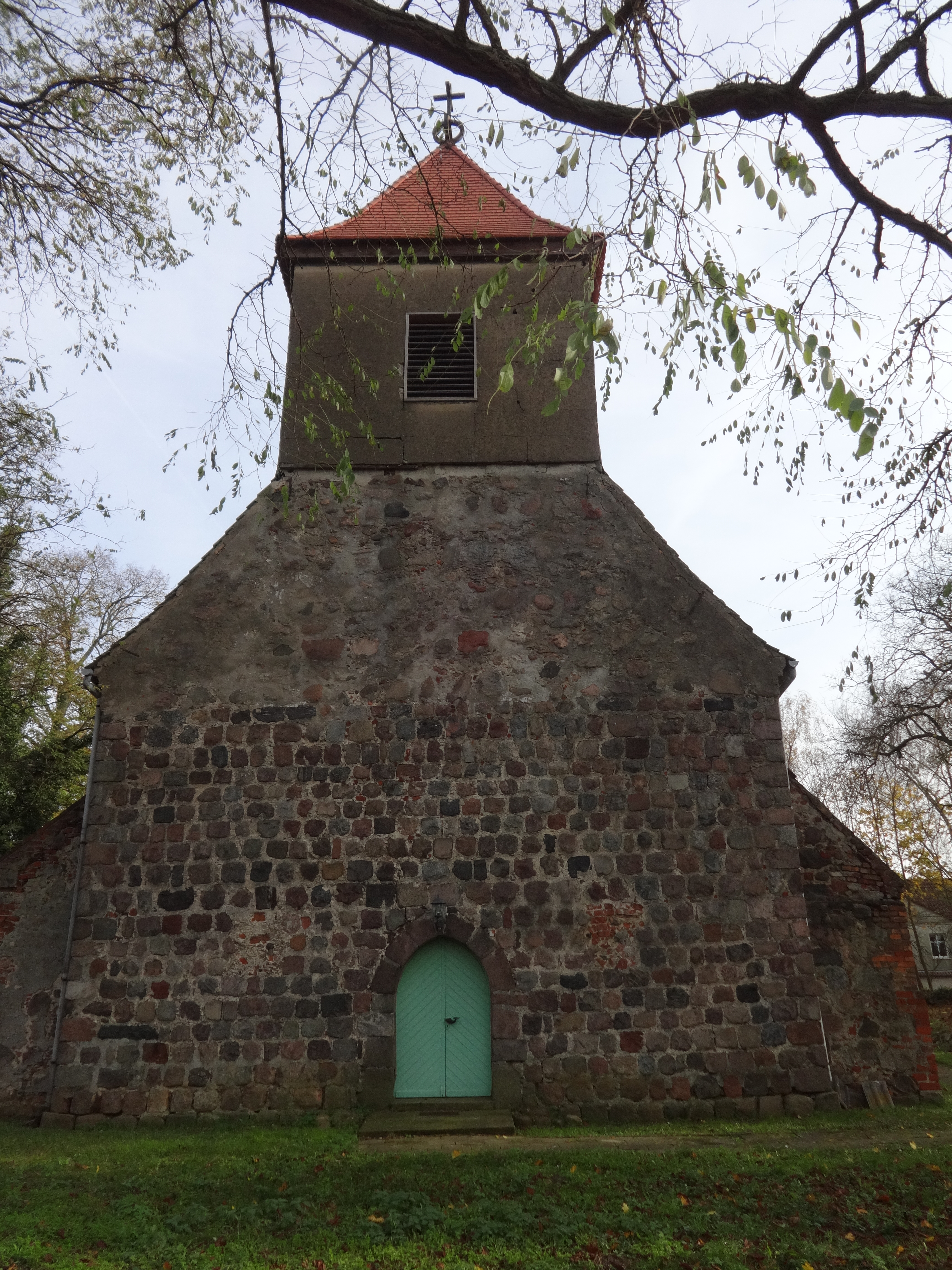 Die Dorfkirche in Obersdorf, einem Ortsteil der Stadt Müncheberg im Landkreis Oder-Spree, entstand in der zweiten Hälfte des 13. Jahrhunderts. Das Bauwerk wurde im Zweiten Weltkrieg stark zerstört und anschließend wiederaufgebaut.